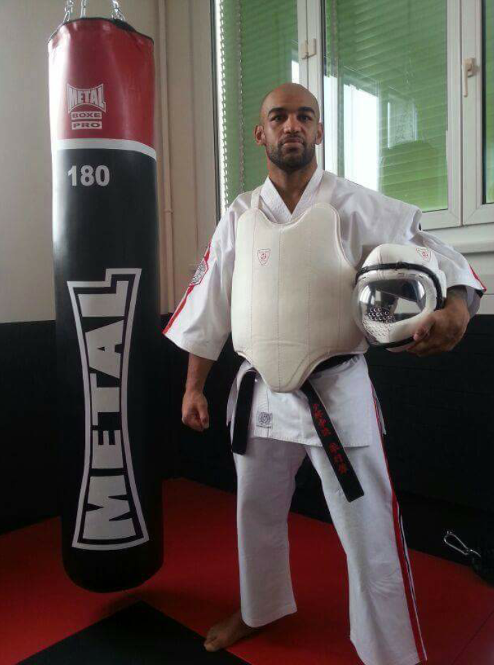 Yoann Kongolo champion de Koshiki et de kick-Boxing